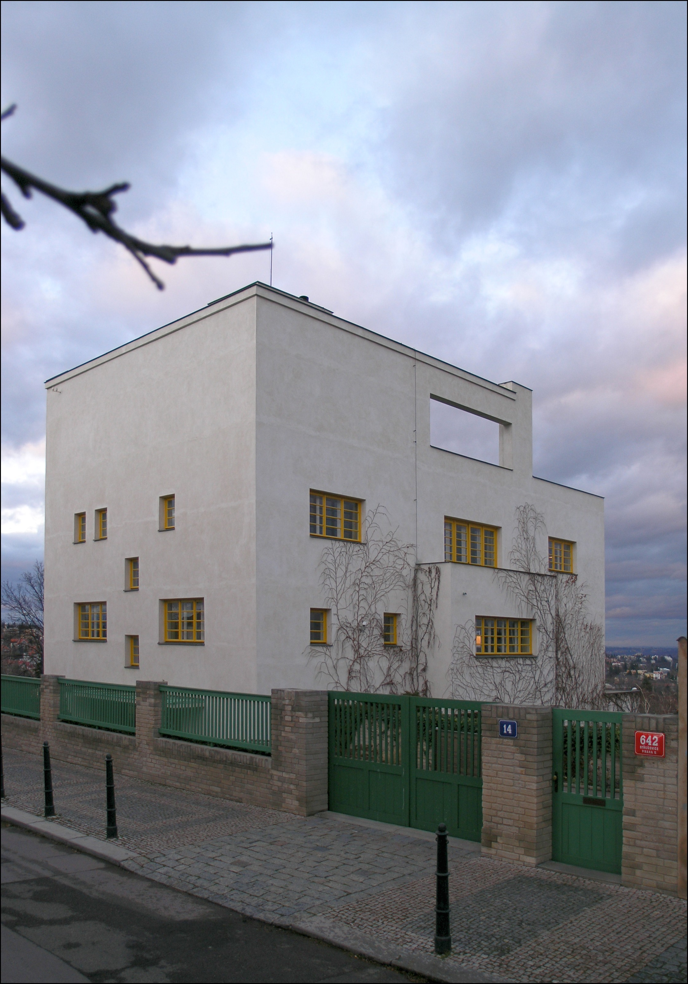 Müllerova vila